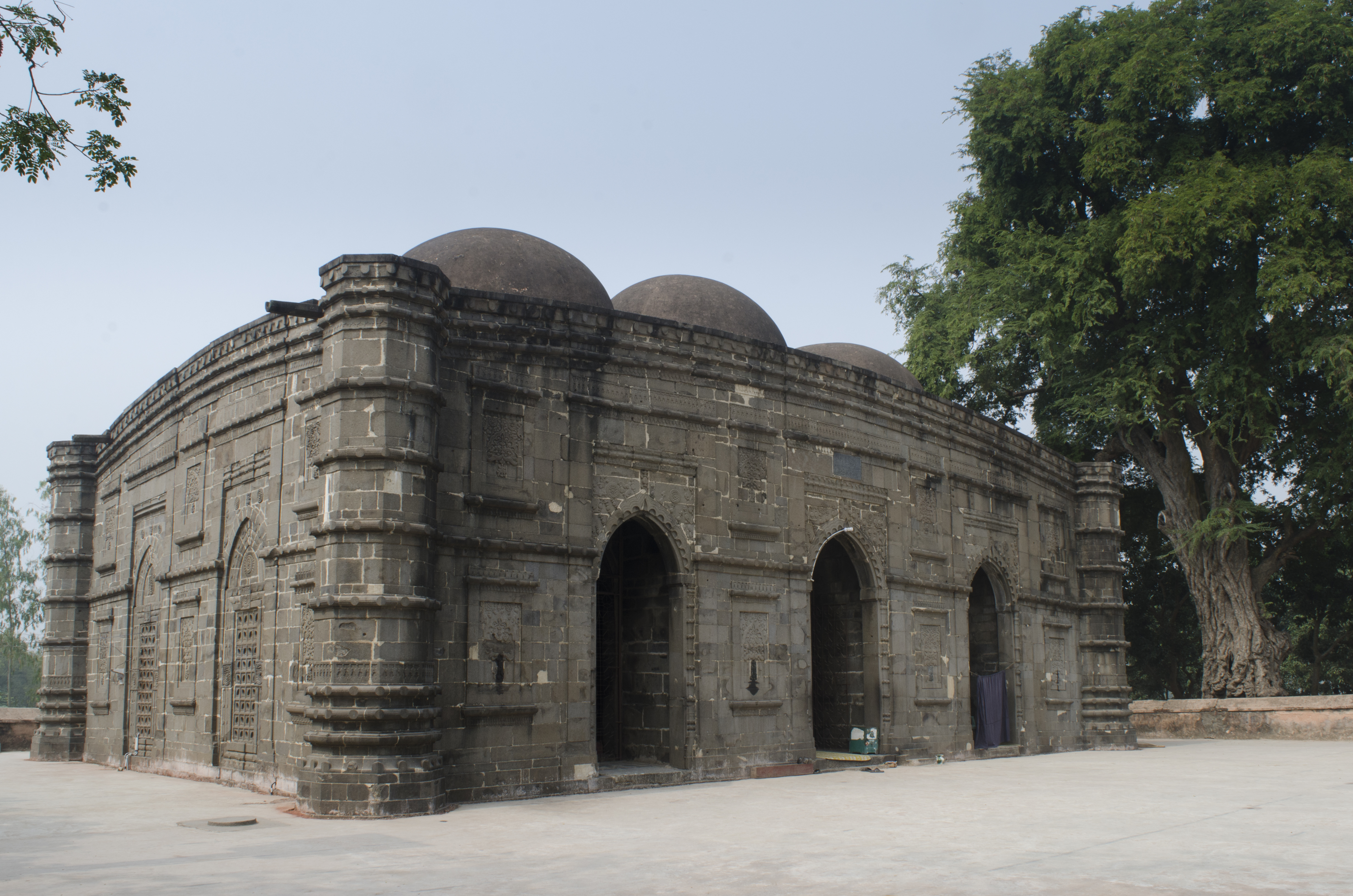 কুসুম্বা মসজিদ